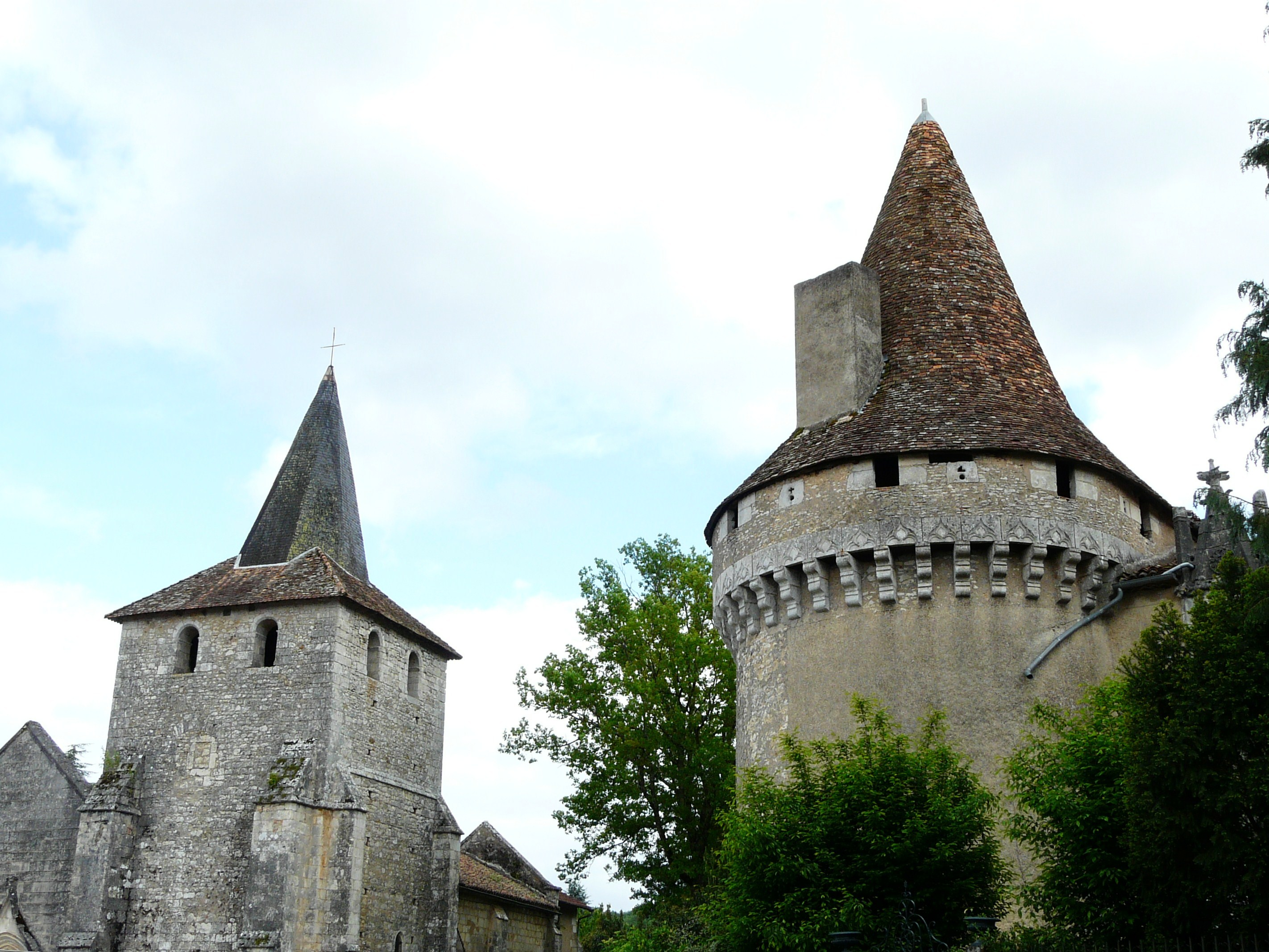 Le château de Javerlhac et l'église Saint-Étienne, Javerlhac-et-la-Chapelle-Saint-Robert, Dordogne, France.